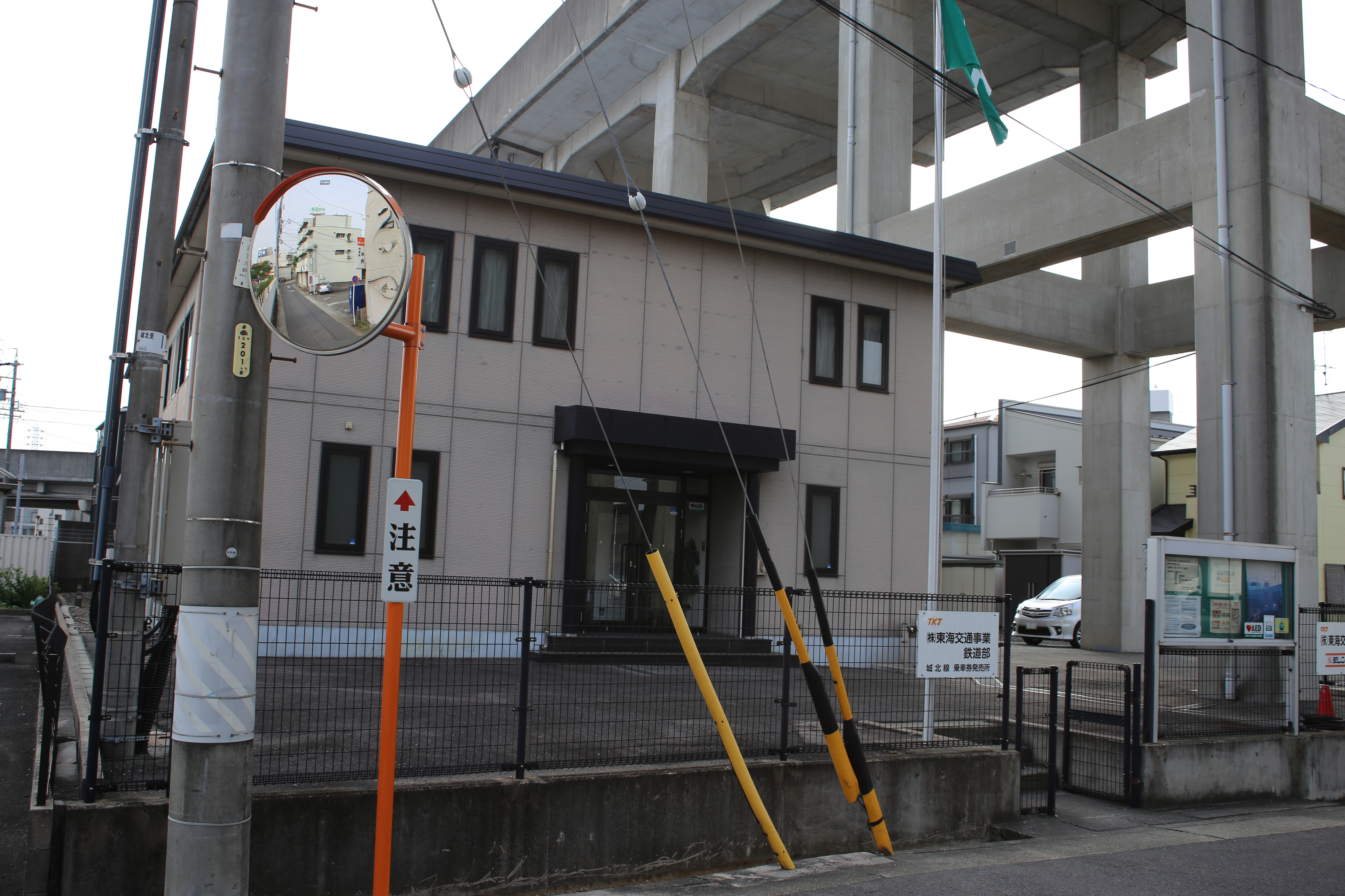 名古屋市西区八筋町の東海交通事業（TKJ）本社を東側公道南側より撮影。ただし、ナンバープレートに月画像処理済。